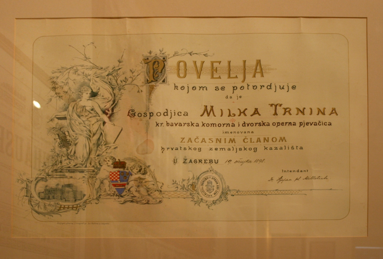 Milki Trnini, snimljeno u Muzeju grada Zagreba